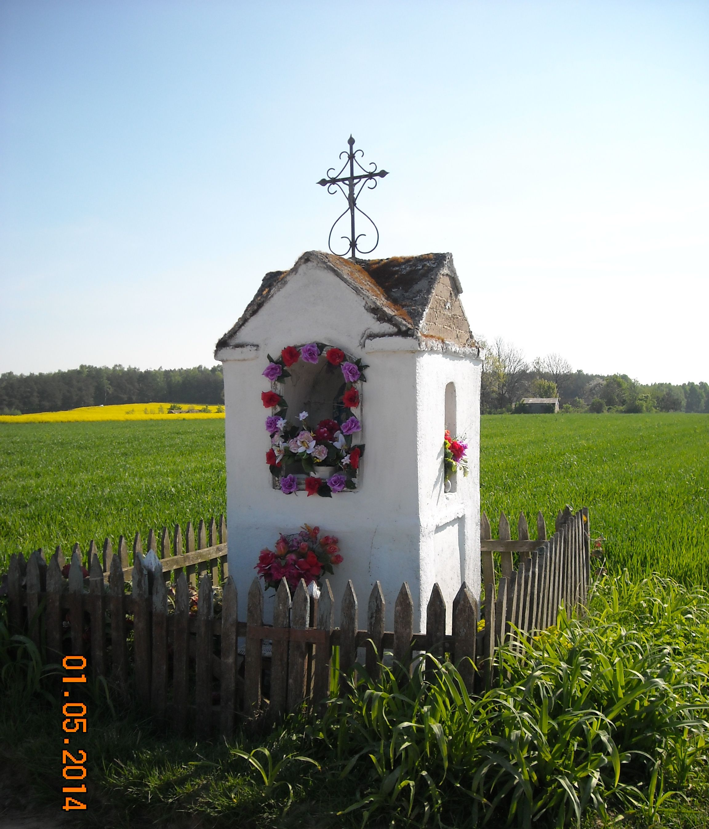 Zdziar Wielki (pow. płocki), kapliczka przydrożna